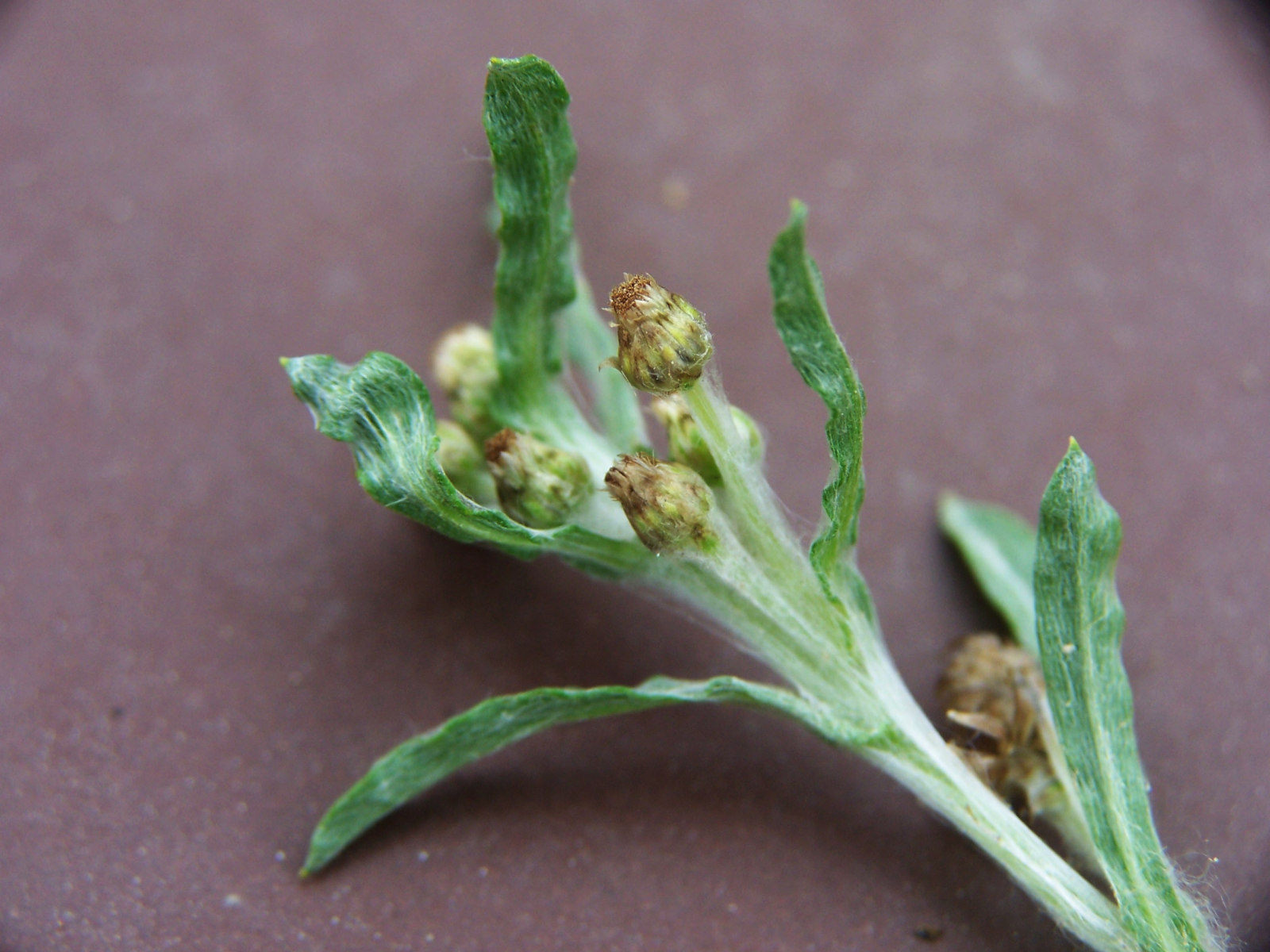 Gnaphalium uliginosum (pl. szarota błotna)